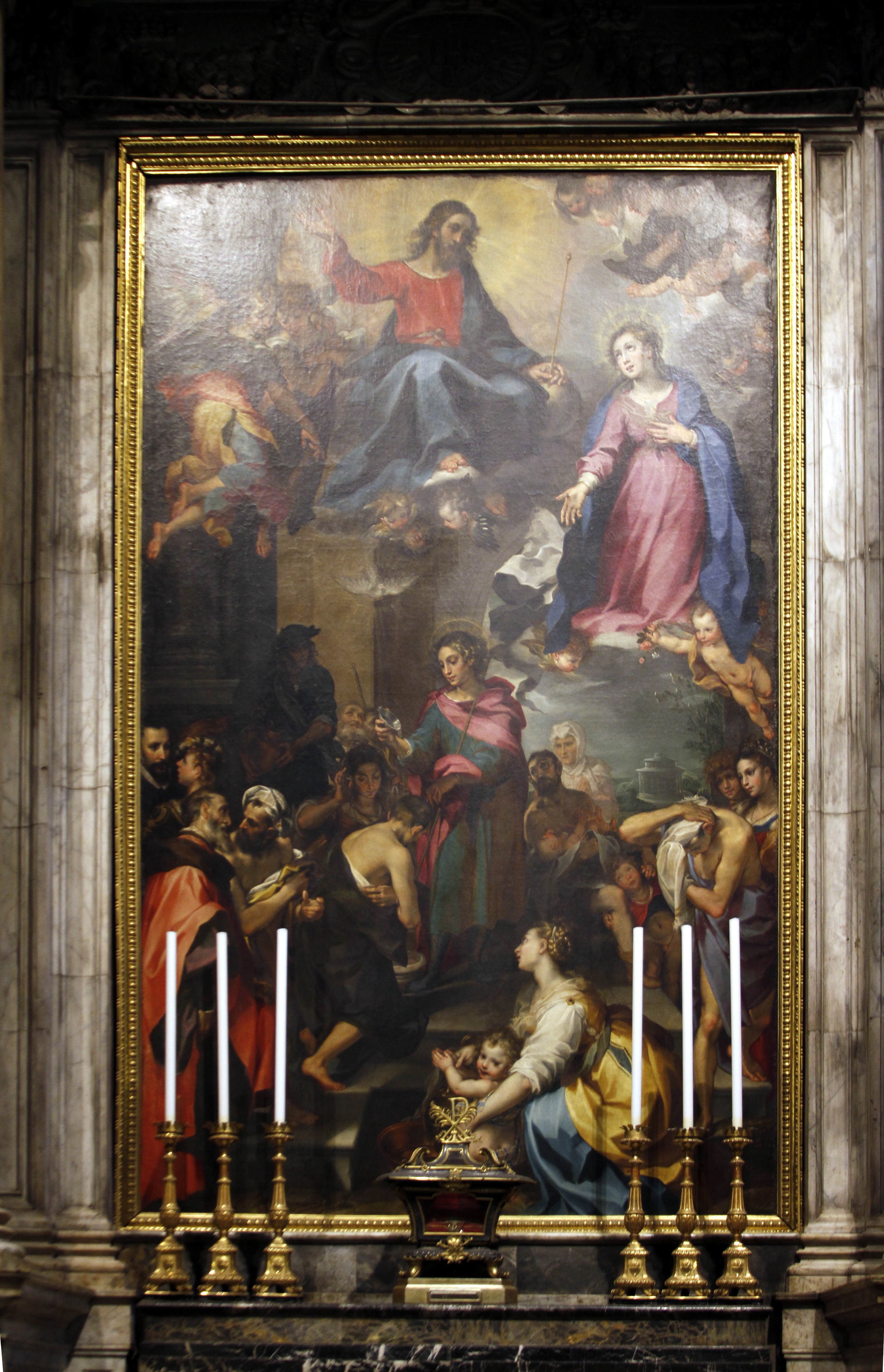 Duomo - Siena